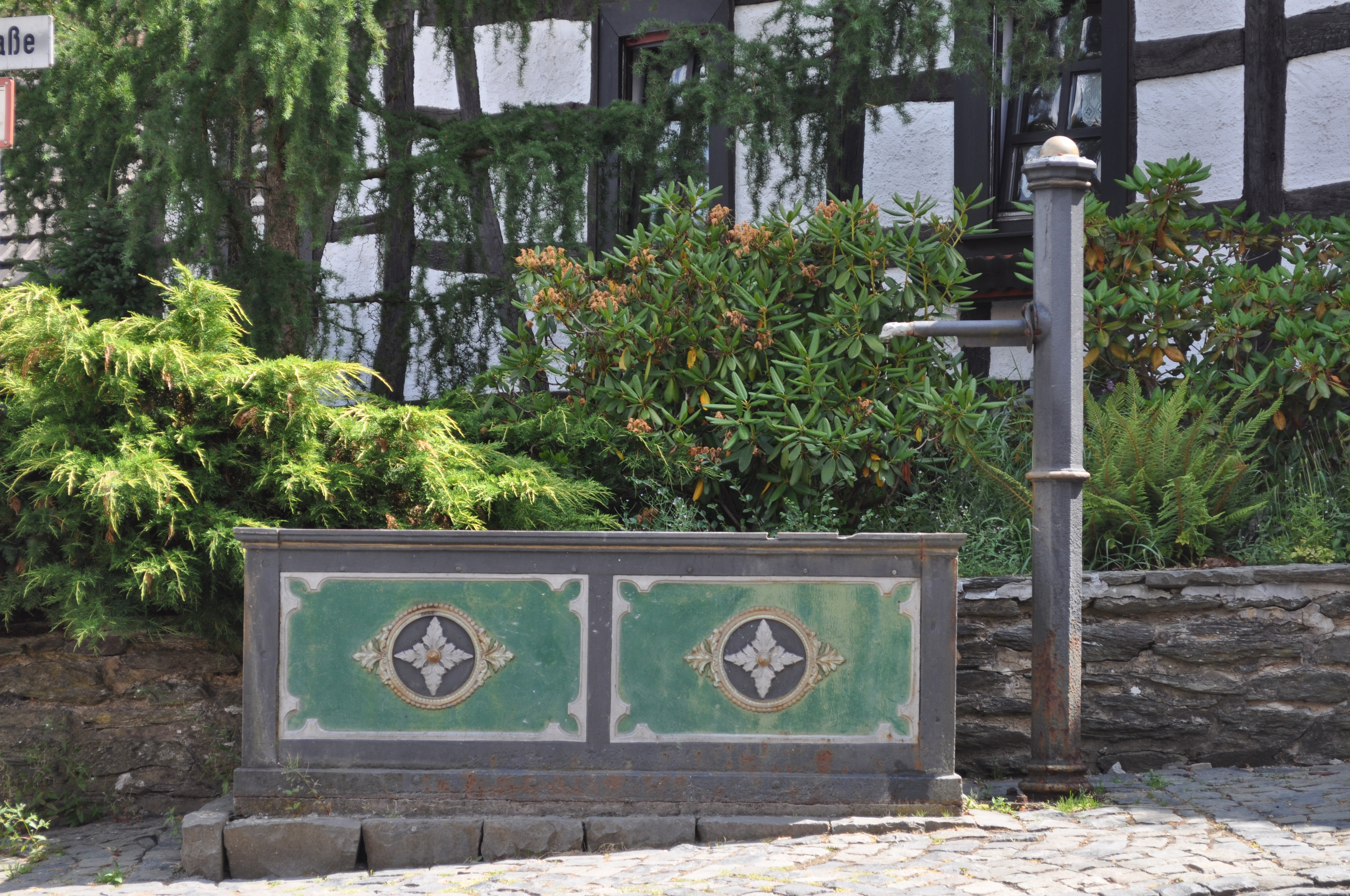 Sanierter gusseisener Brunnen in Maulof, Ringstraße